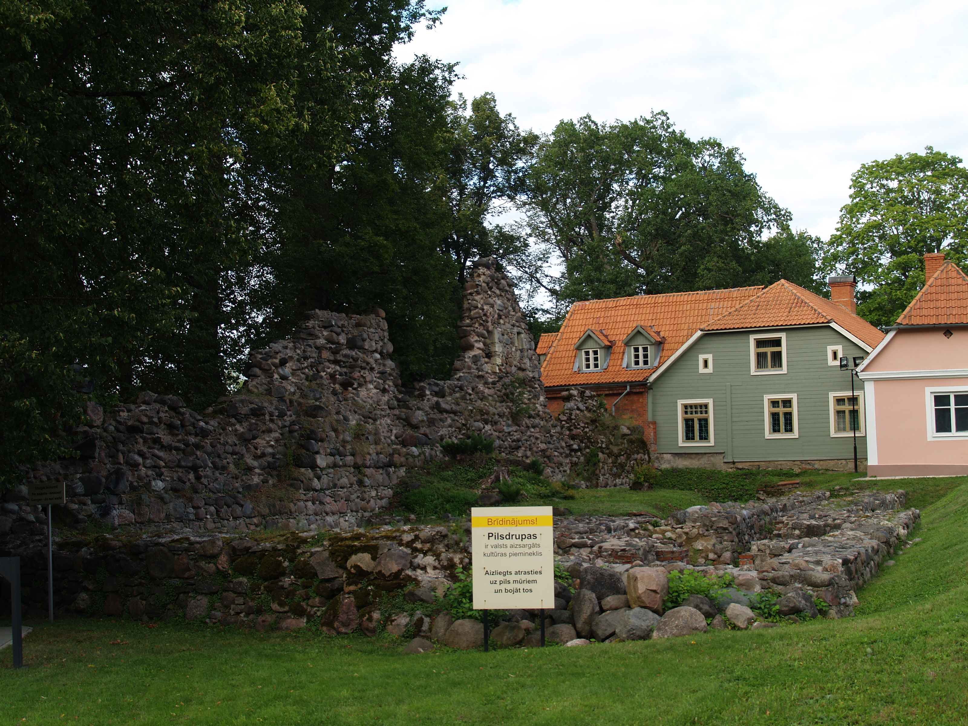 Valmiera vana apteek linnusevaremetes, kus nüüd asub Valmiera muuseum.